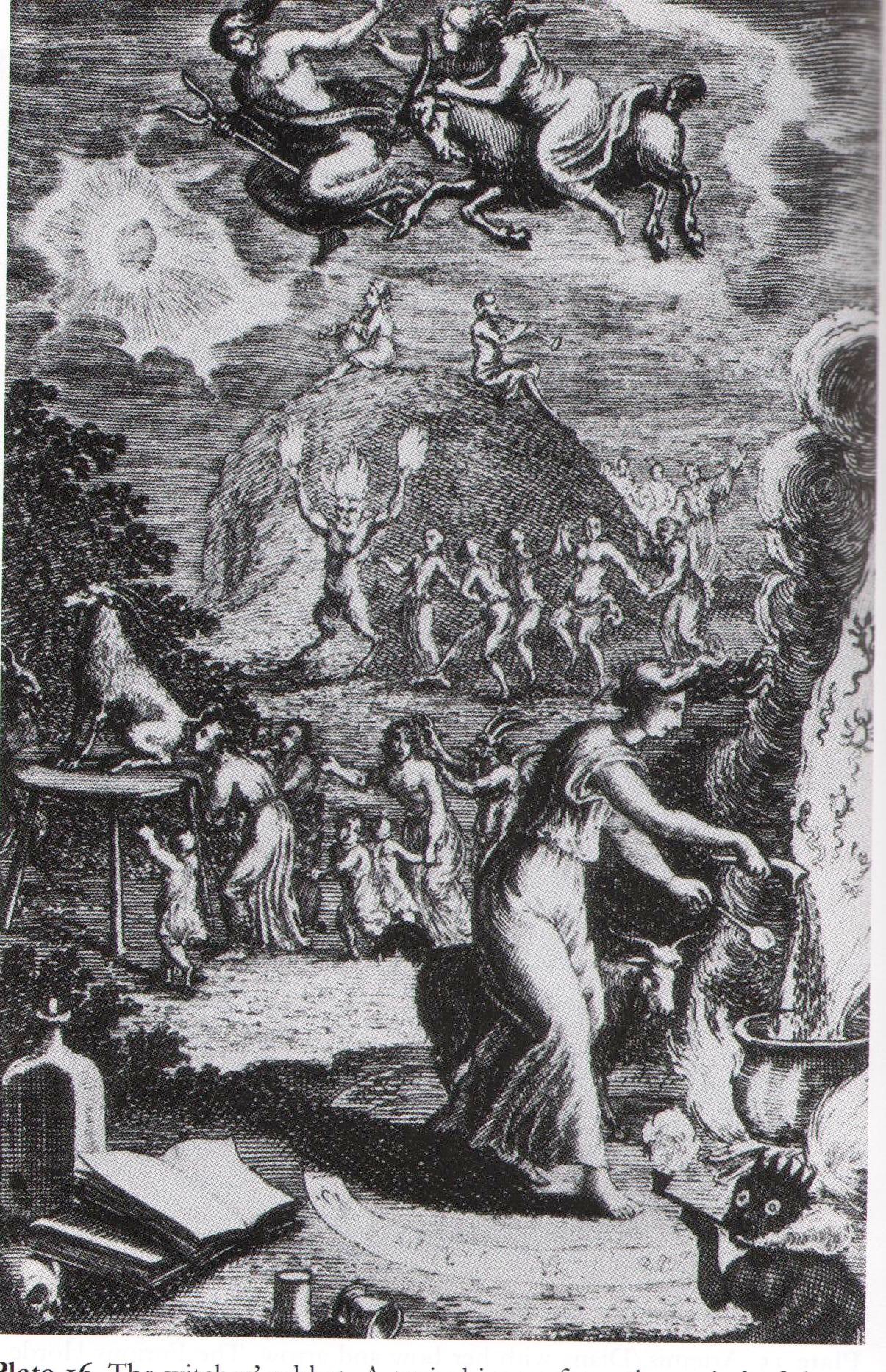 Một người phụ nữ đang thực hiện nghi lễ